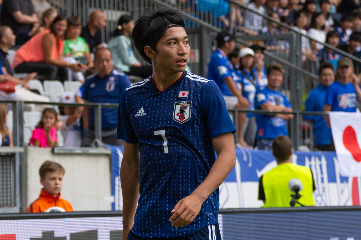 Gaku Shibasaki at Japan vs Paraguay (June 2018)